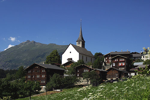 Pfarrkirche St.Georg in Ernen, Schweiz (10. Juli 2003)